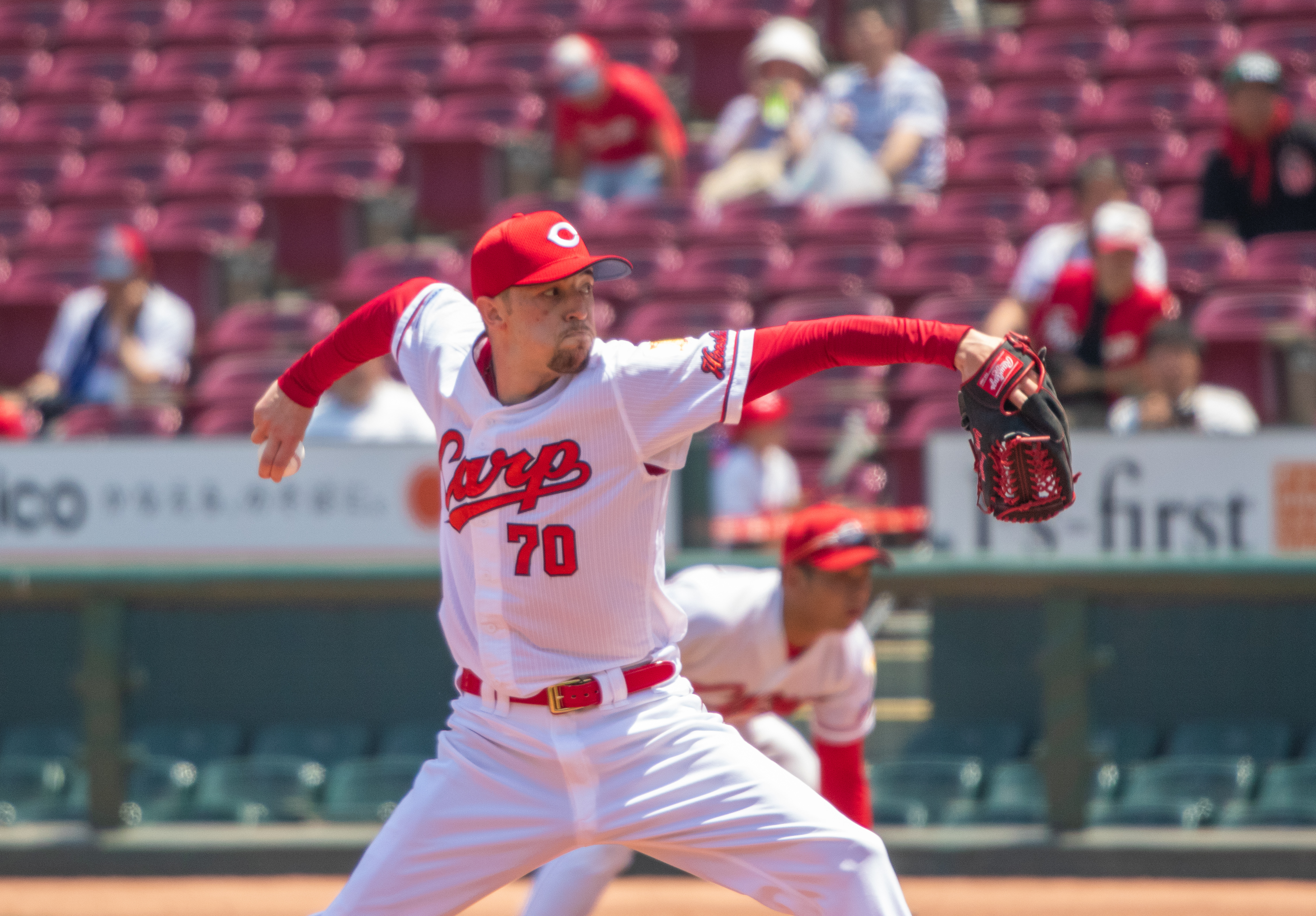 2019/5/25 マツダスタジアム